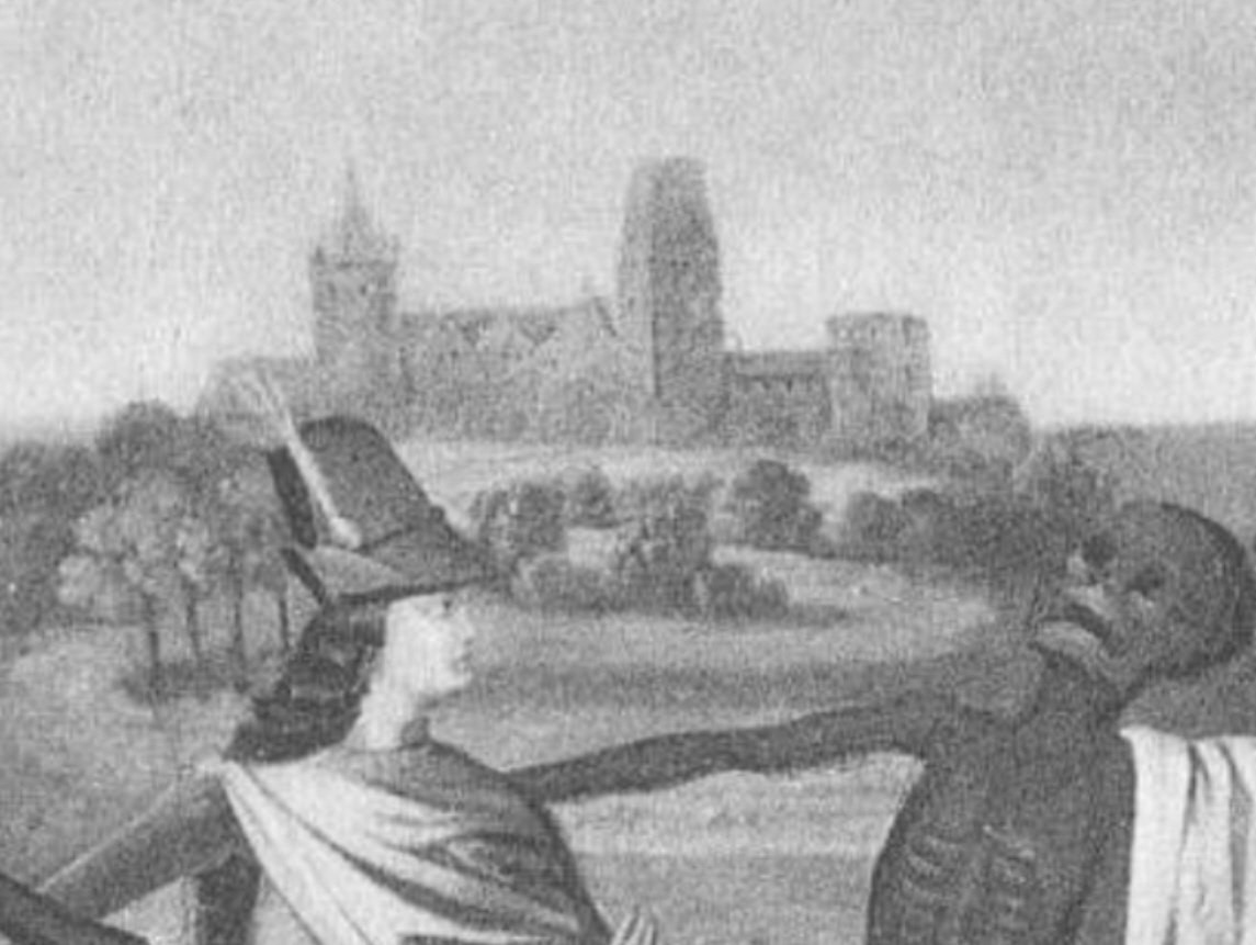 Detail aus dem Lübecker Totentanz: Burg hinter der Figur des Jünglings